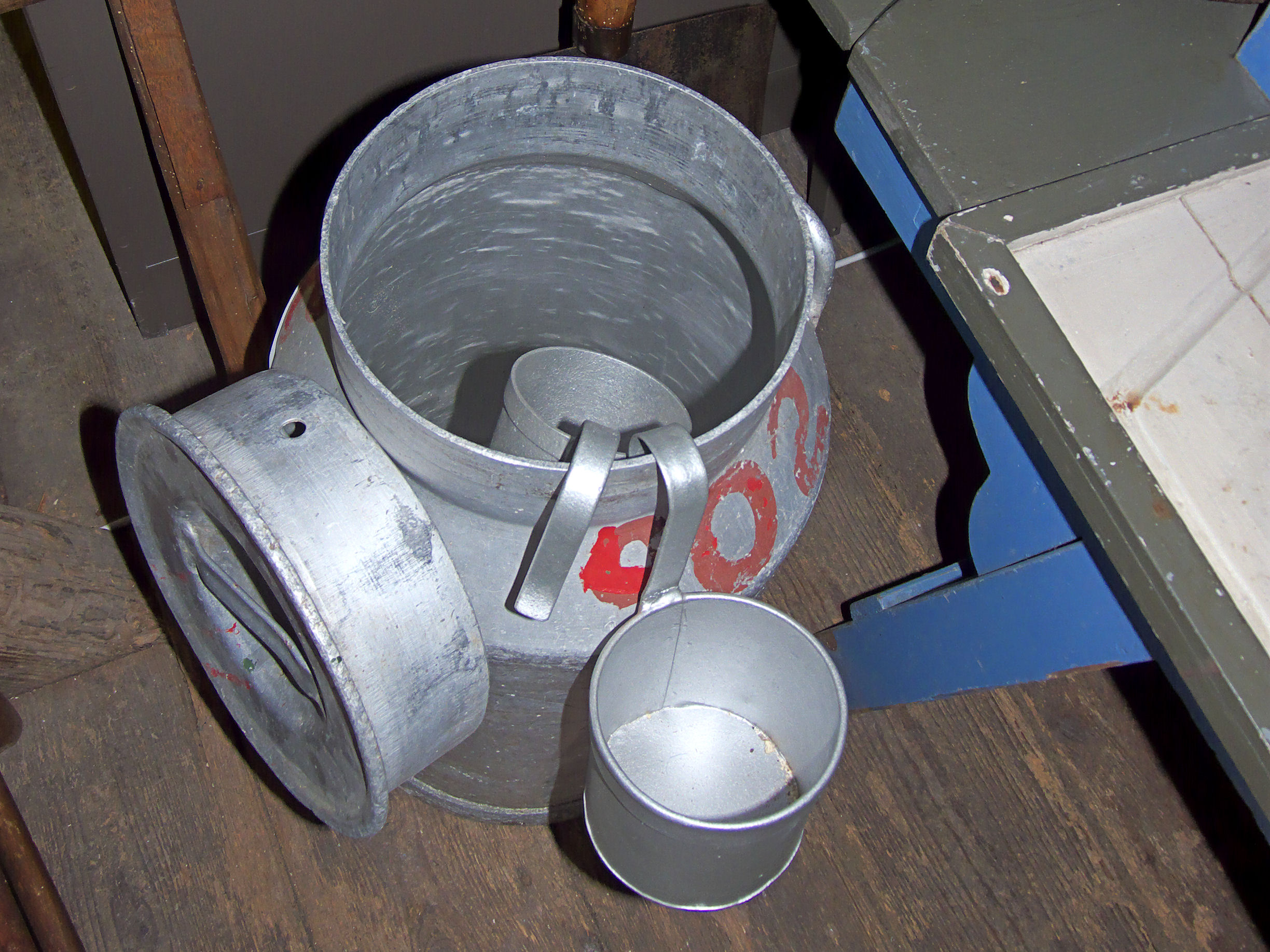 Melkbus met litermaten in het molenmuseum van molen De Liefde in Streefkerk